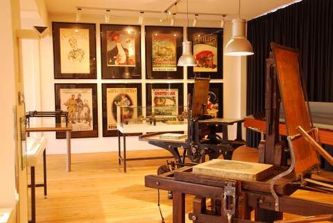 Een deel van de machinezaal van het steendrukmuseum